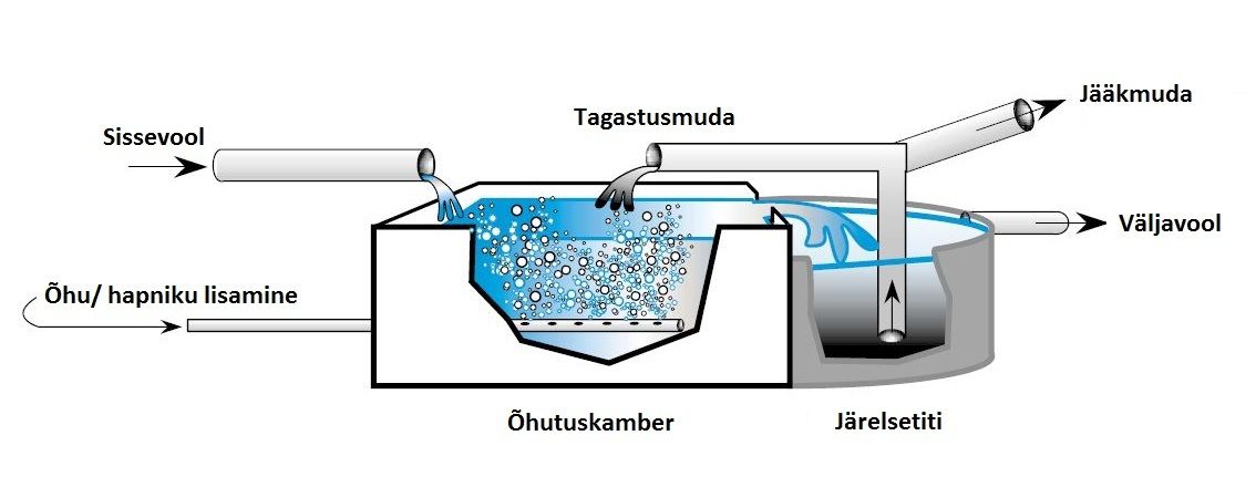 Aktiivmudaprotsessi skemaatiline joonis